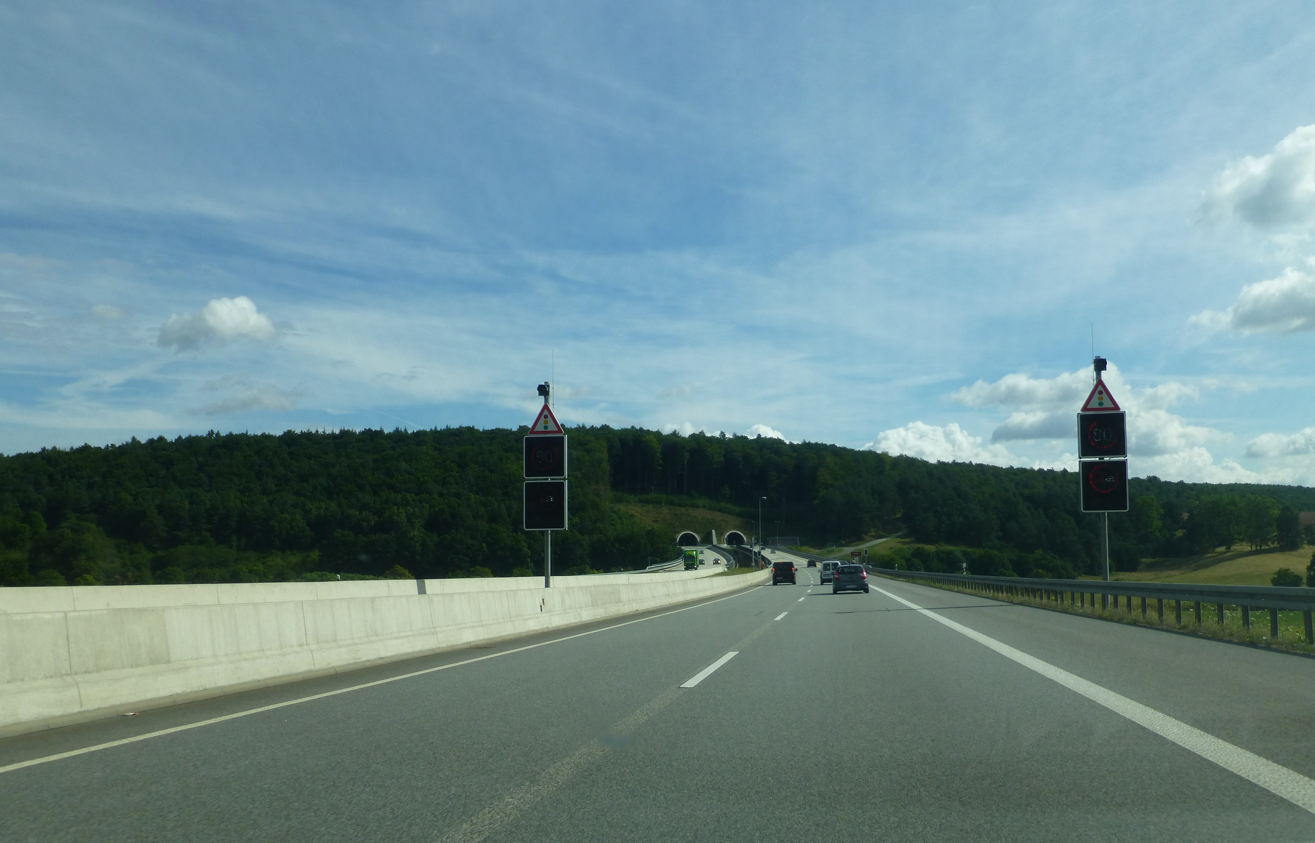 Einfahrt zum Westportal des Höllbergtunnels